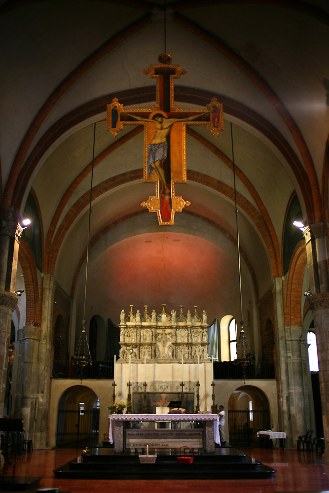 L'altare maggiore della basilica di Sant'Eustorgio con il grande crocifisso monumentale del XIII secolo